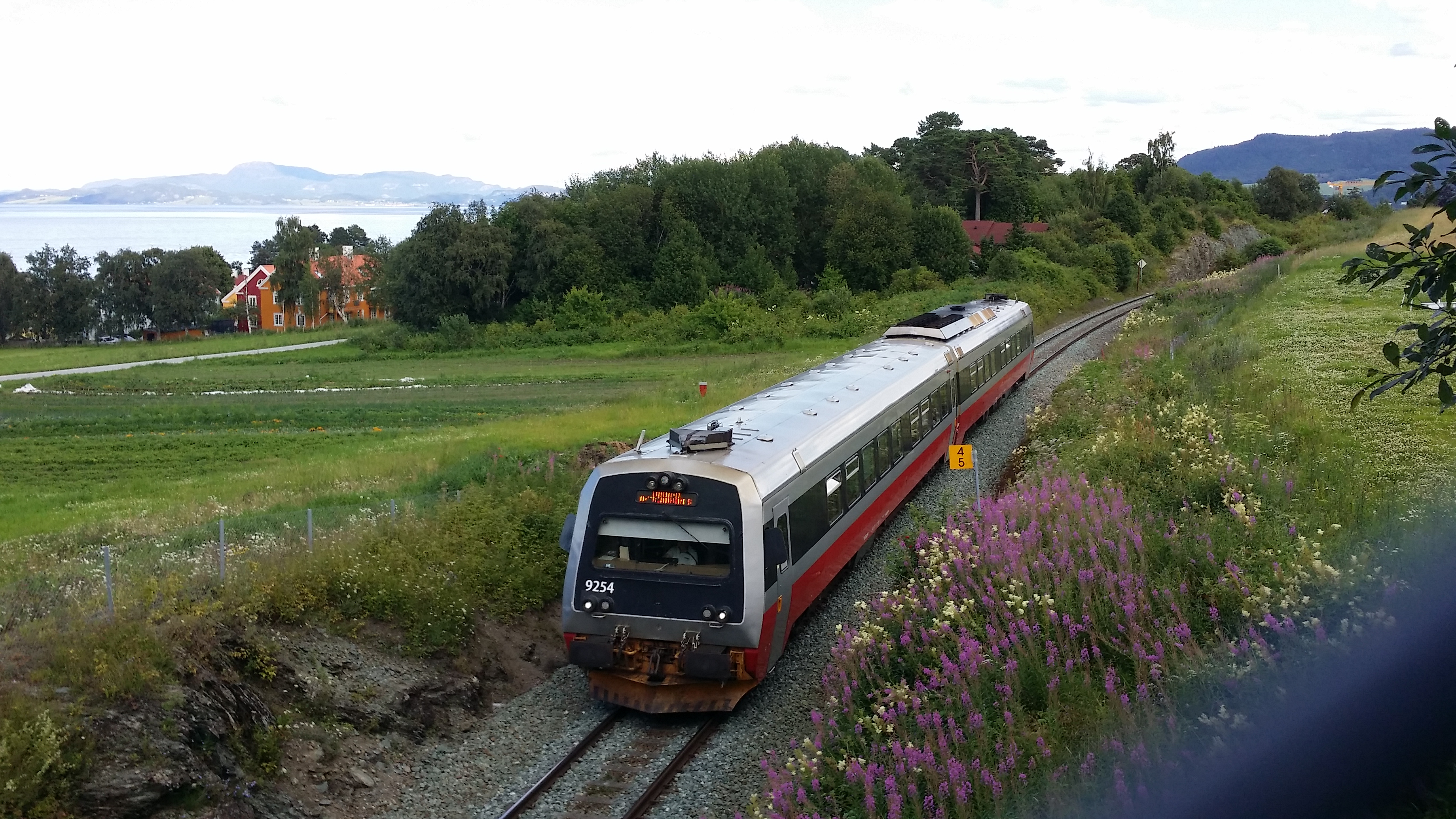 92.54 + 92.04 ved Rotvoll.